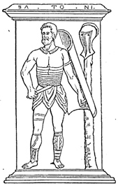 Myrmillo - afkomstig uit Meyers Konversationslexikon 1888 - vrij van auteursrechten